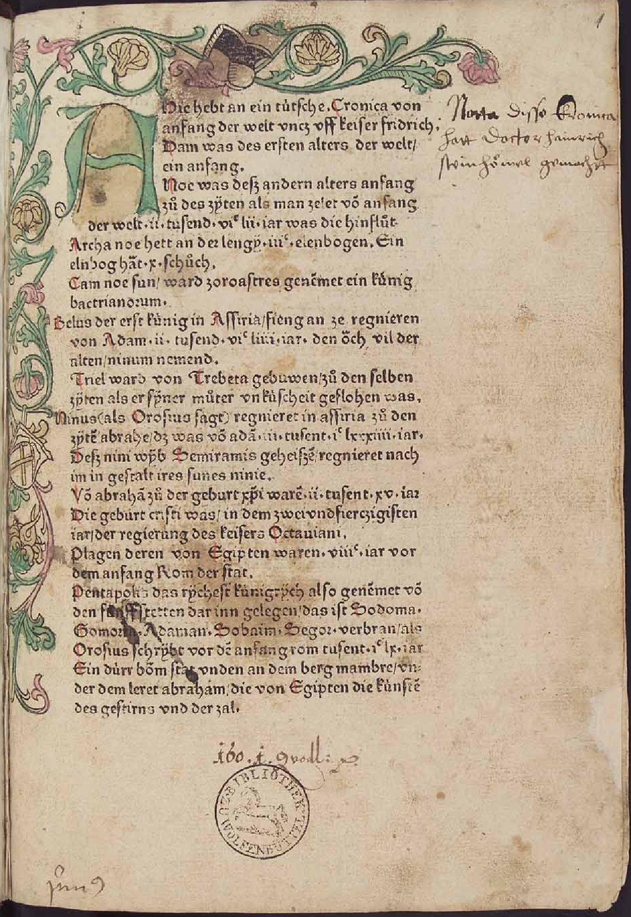 Hie hebt an ein tütsche. Cronica von anfang der welt vncz vff keiser fridrich. ADam was des ersten alters der welt/ ein anfang. Bl. 1. Ulm : Zainer, 10.II.1473